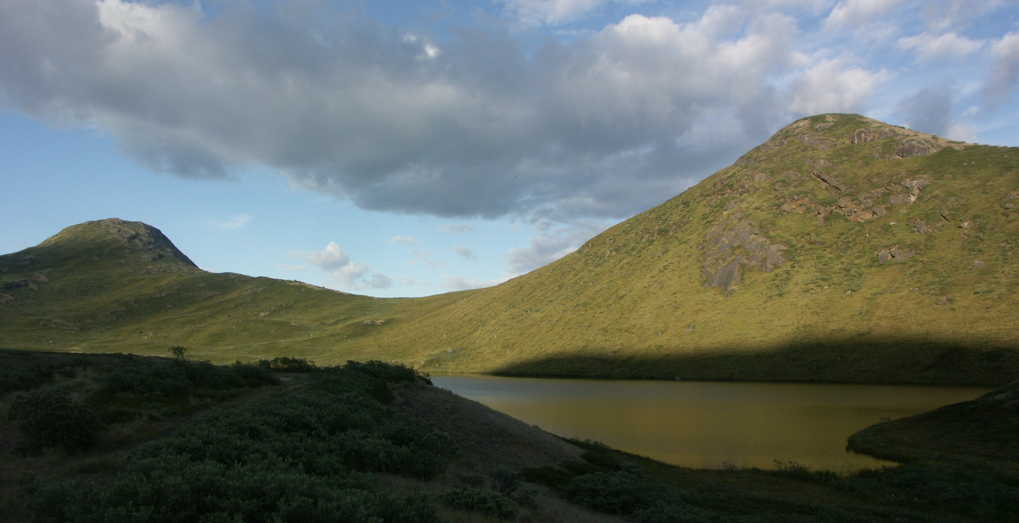 Midnight sun under Sugar Loaf (Sukkertoppen), 7km east of Kangerlussuaq, Greenland